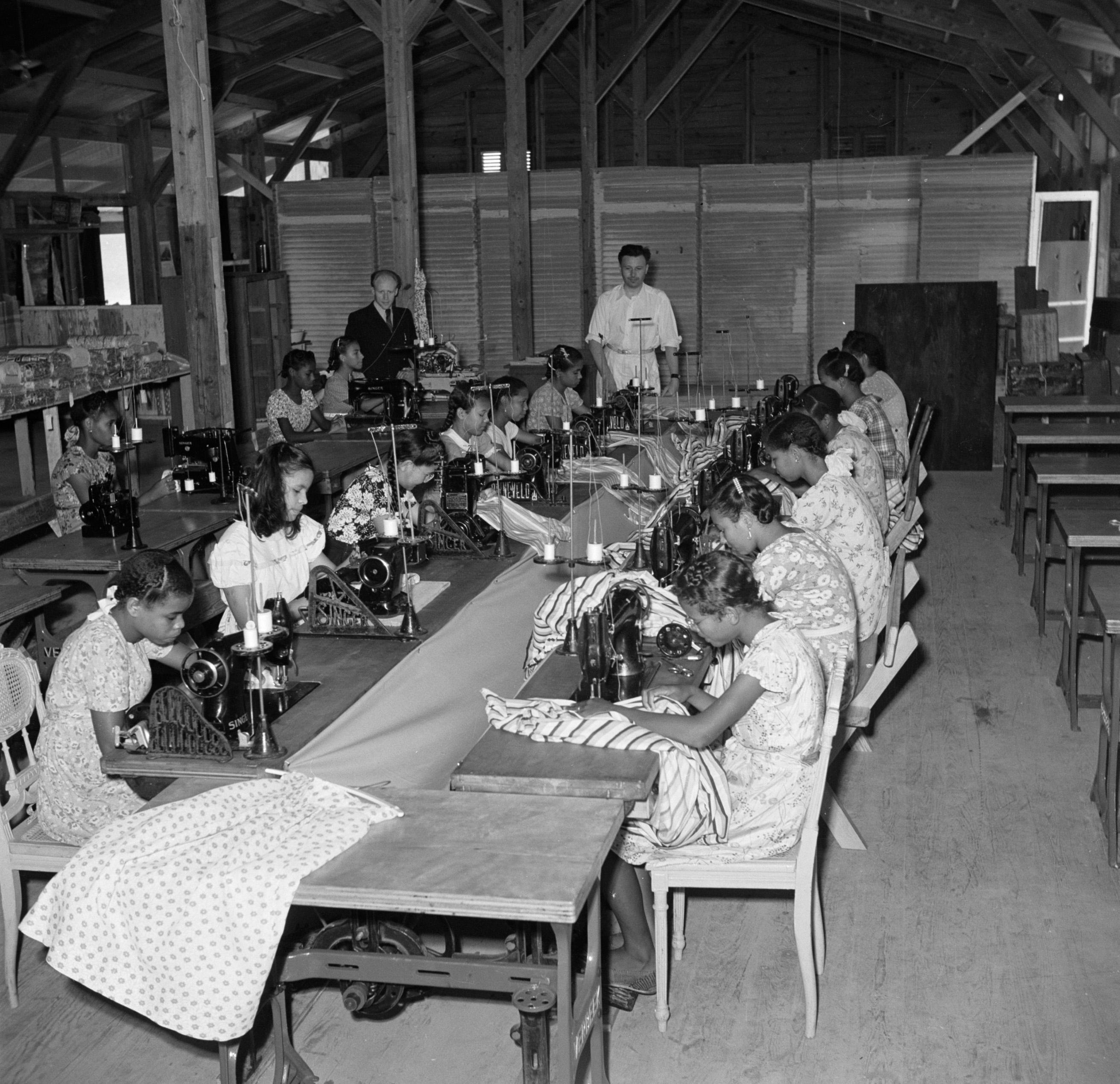 Collectie / Archief : Fotocollectie Van de Poll Reportage / Serie : Reis naar Suriname en de Nederlandse Antillen Beschrijving : Een naaiatelier voor bedrijfskleding op Bonaire Datum : 1947 Locatie : Bonaire, Nederlandse Antillen Trefwoorden : kledingindustrie Fotograaf : Poll, Willem van de, [onbekend] Auteursrechthebbende : Nationaal Archief Materiaalsoort : Negatief (zwart/wit) Nummer archiefinventaris : bekijk toegang 2.24.14.02 Bestanddeelnummer : 252-8411